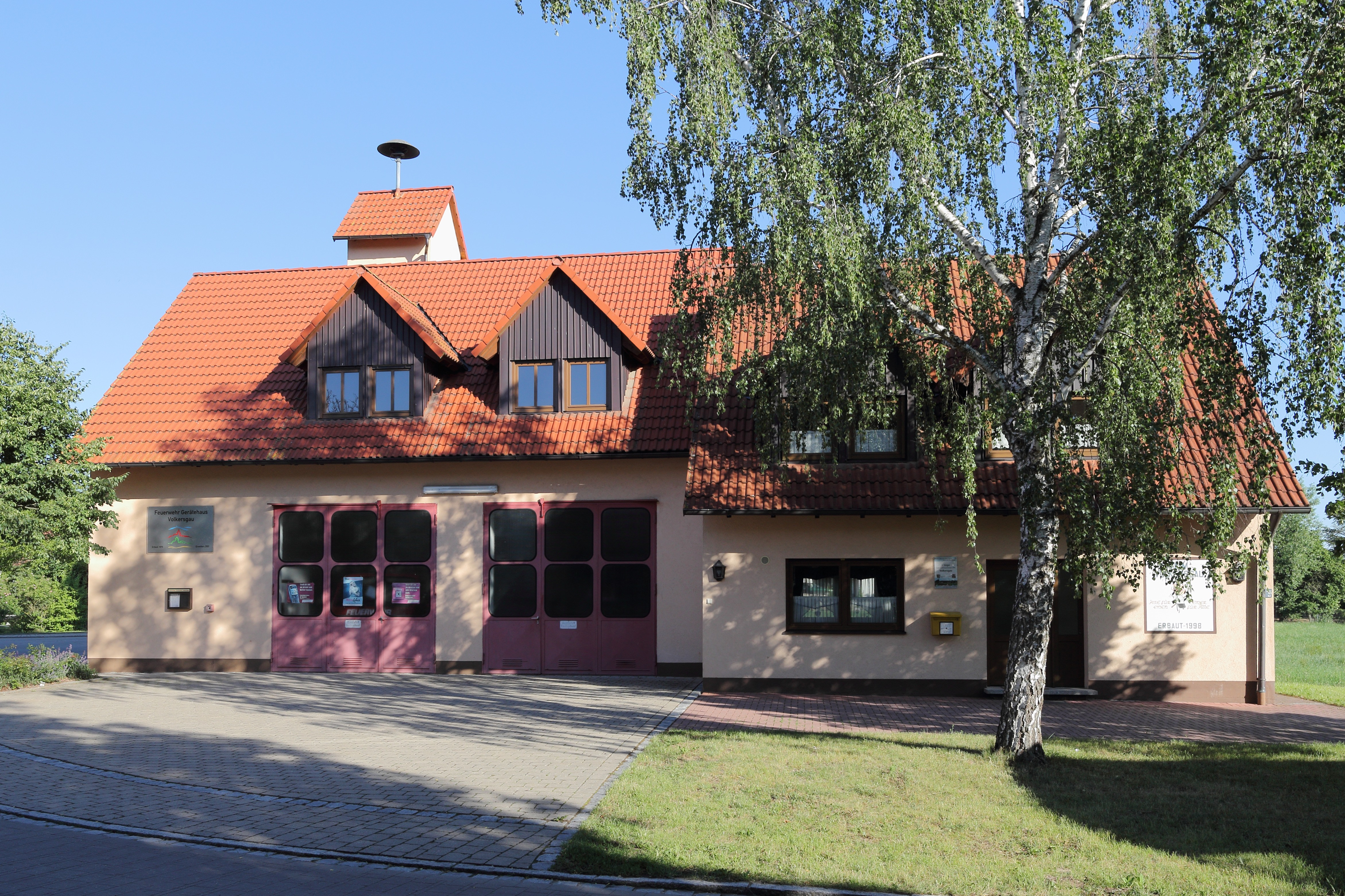 Volkersgau - Feuerwehrgerätehaus